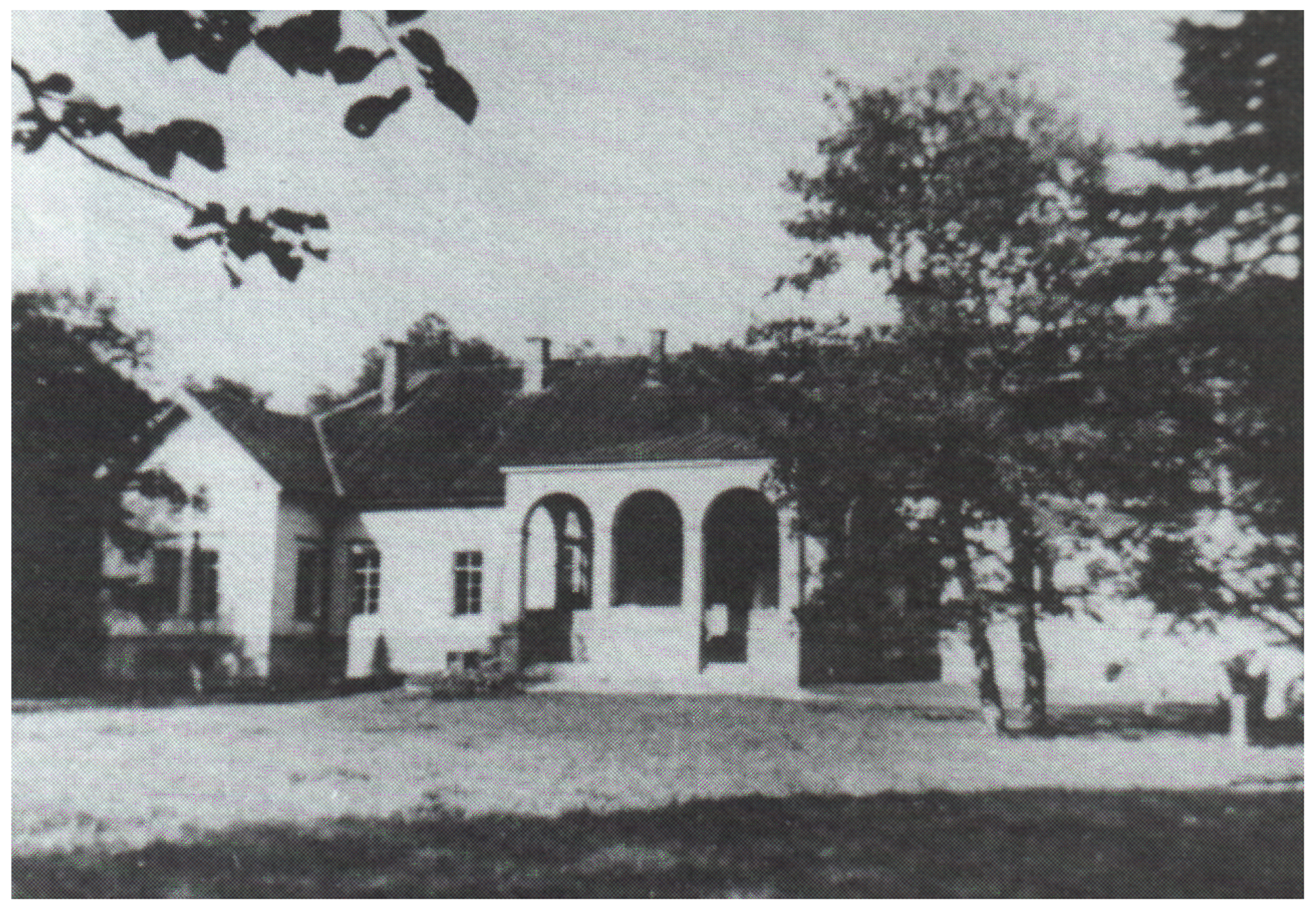 Gutshaus Tois (Pruuna) im Kirchspiel Ampel (Jerwen) -Baron Dellingshausen'scher Besitz. Pruuna mõis (saksa keeles: Tois ka Corbenorm) oli Järvamaal Ambla kihelkonnas Pruuna külas. (File:Pruuna mois.jpg)